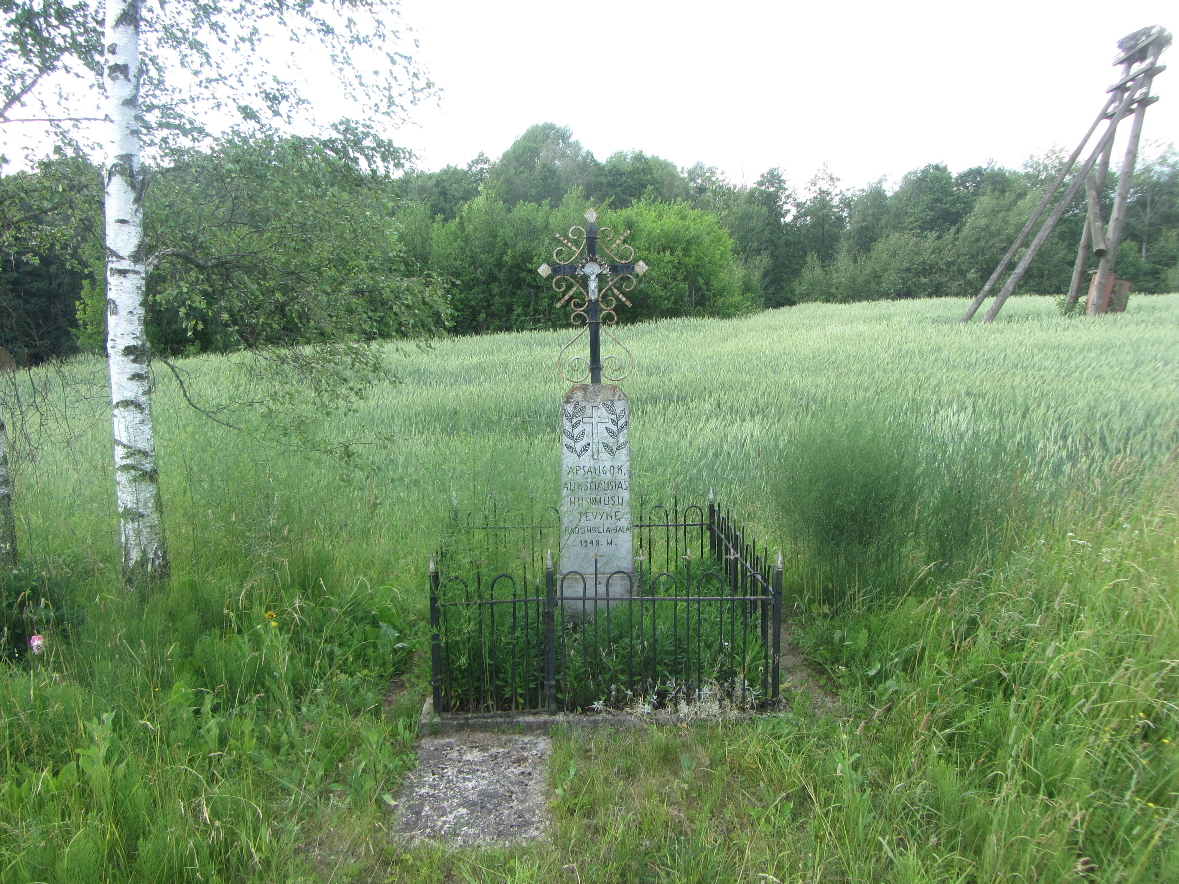 Lazdijų sen., Lithuania